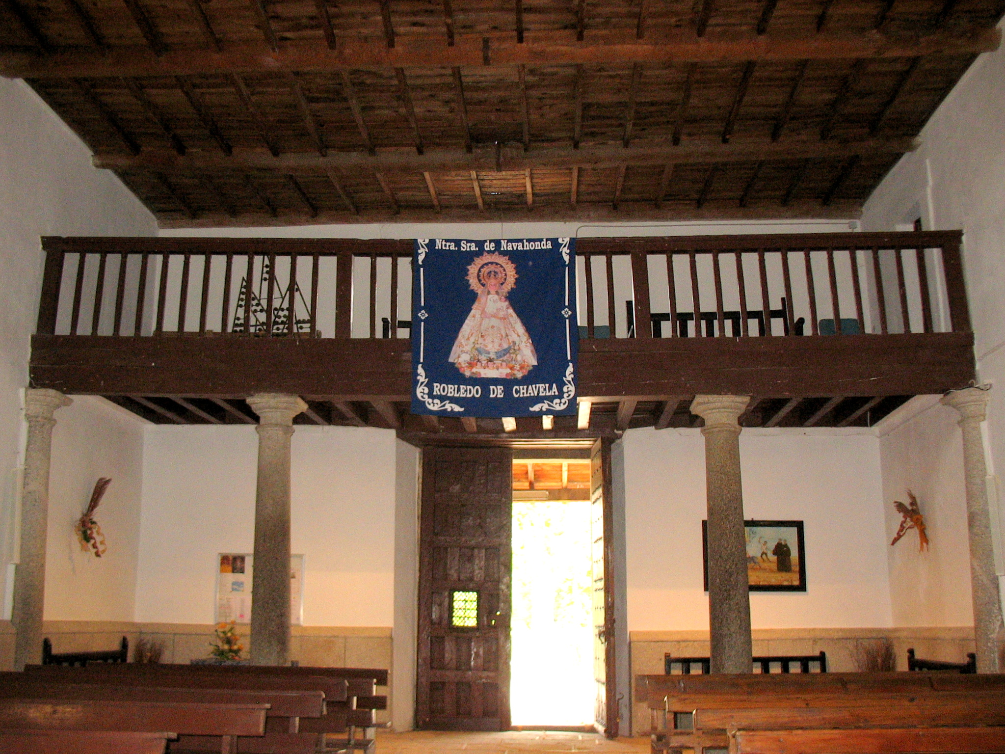 Ermita de Navahonda (Robledo de Chavela, Comunidad de Madrid, España). Coro.